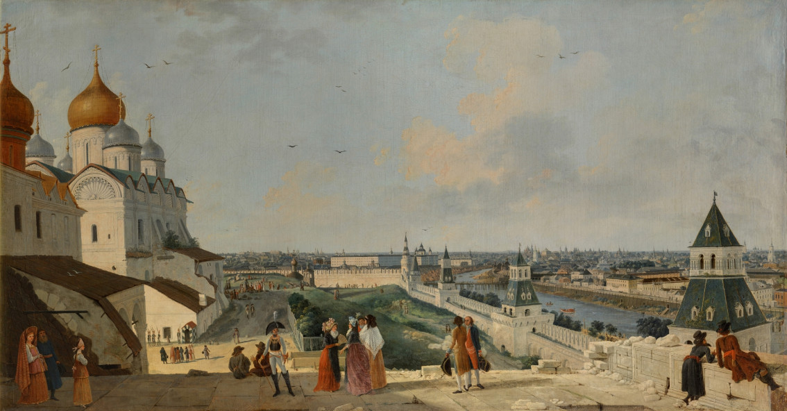 Делабарт Вид на Москву с балкона Кремлевского дворца в сторону Москворецкого моста